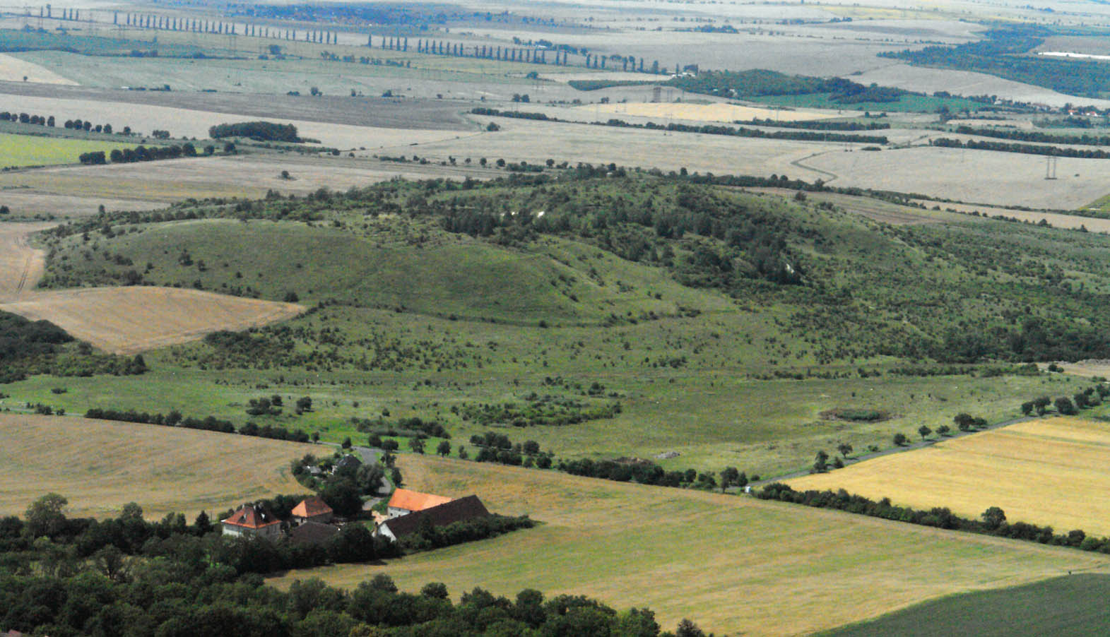 Bečov, okres Most. Písečný vrch, chráněné území, paleolitické naleziště.